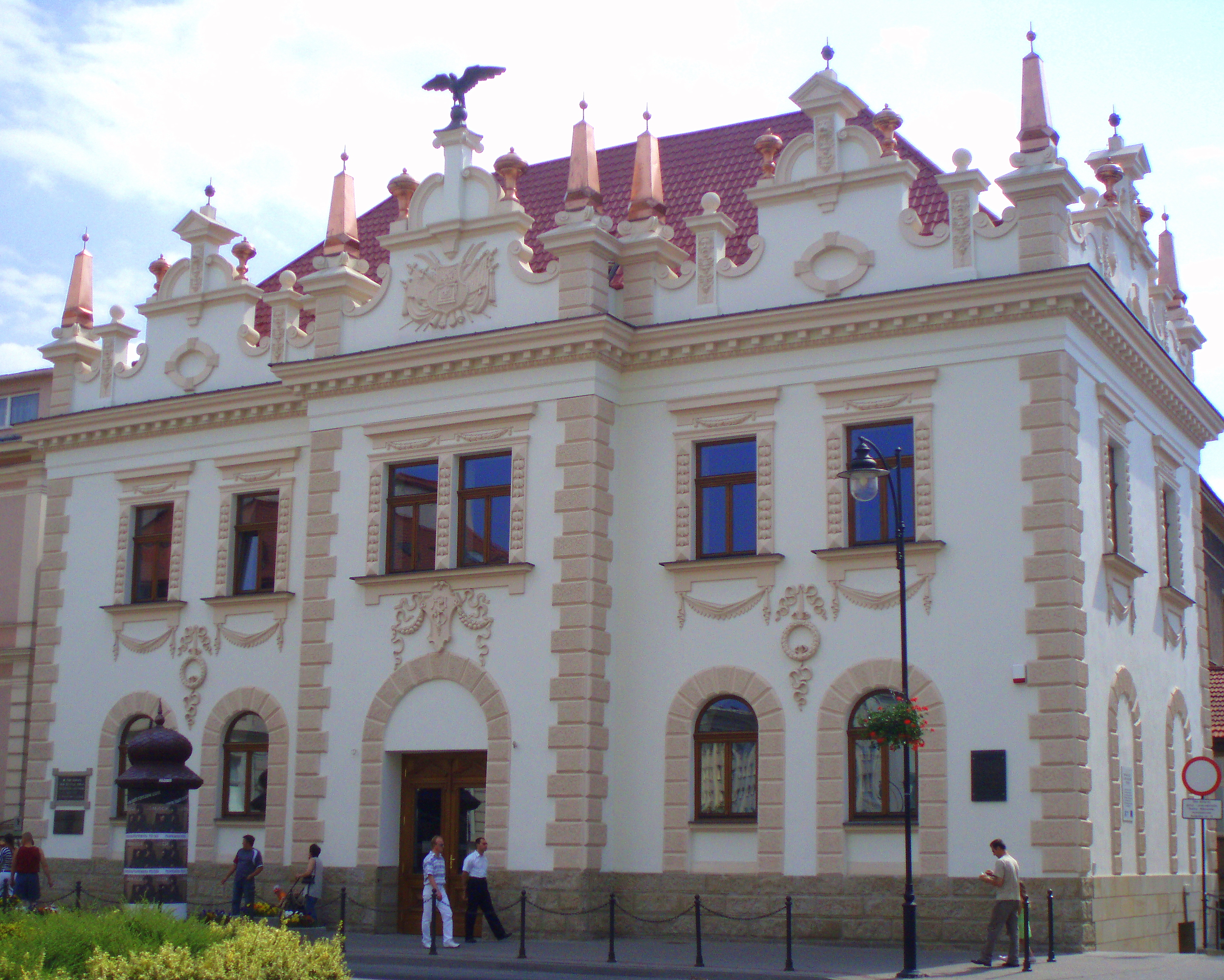 Rzeszów